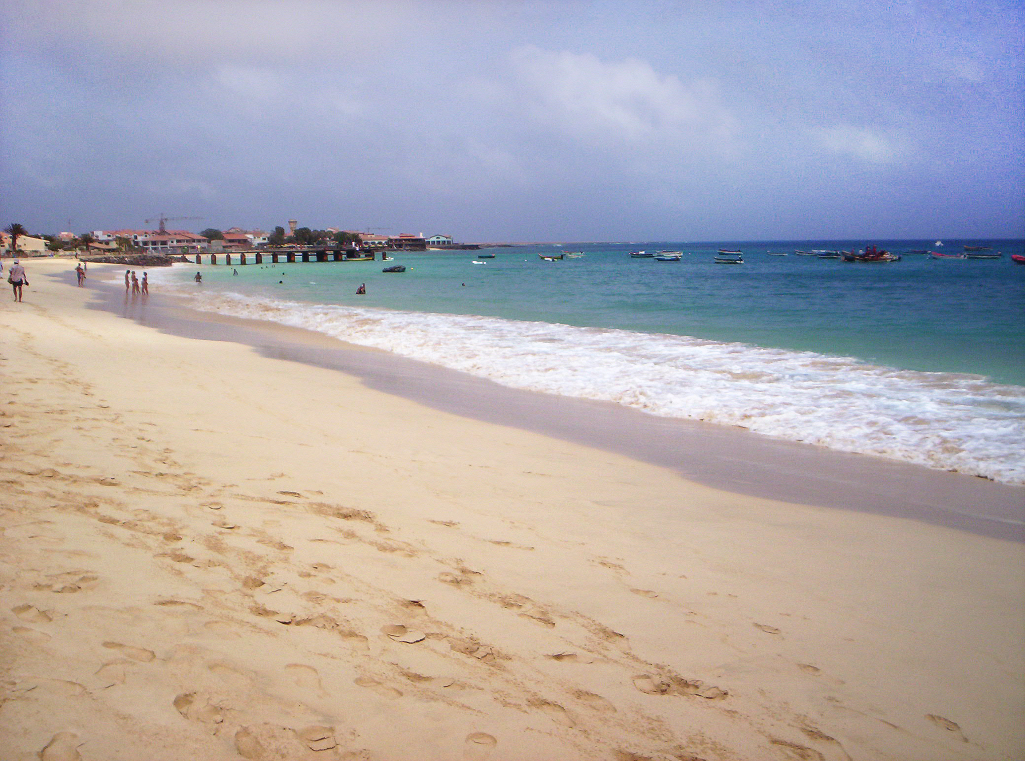 Areal de Santa Maria, na Ilha do Sal, em Cabo Verde.